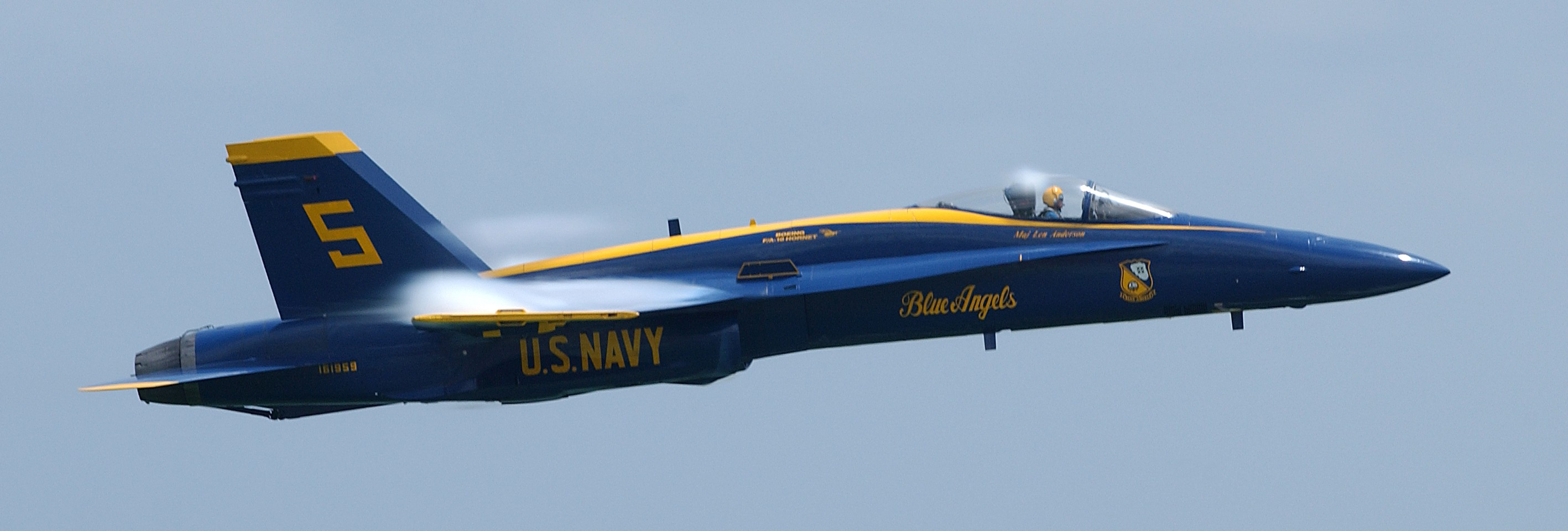 Boeing F/A-18 Hornet